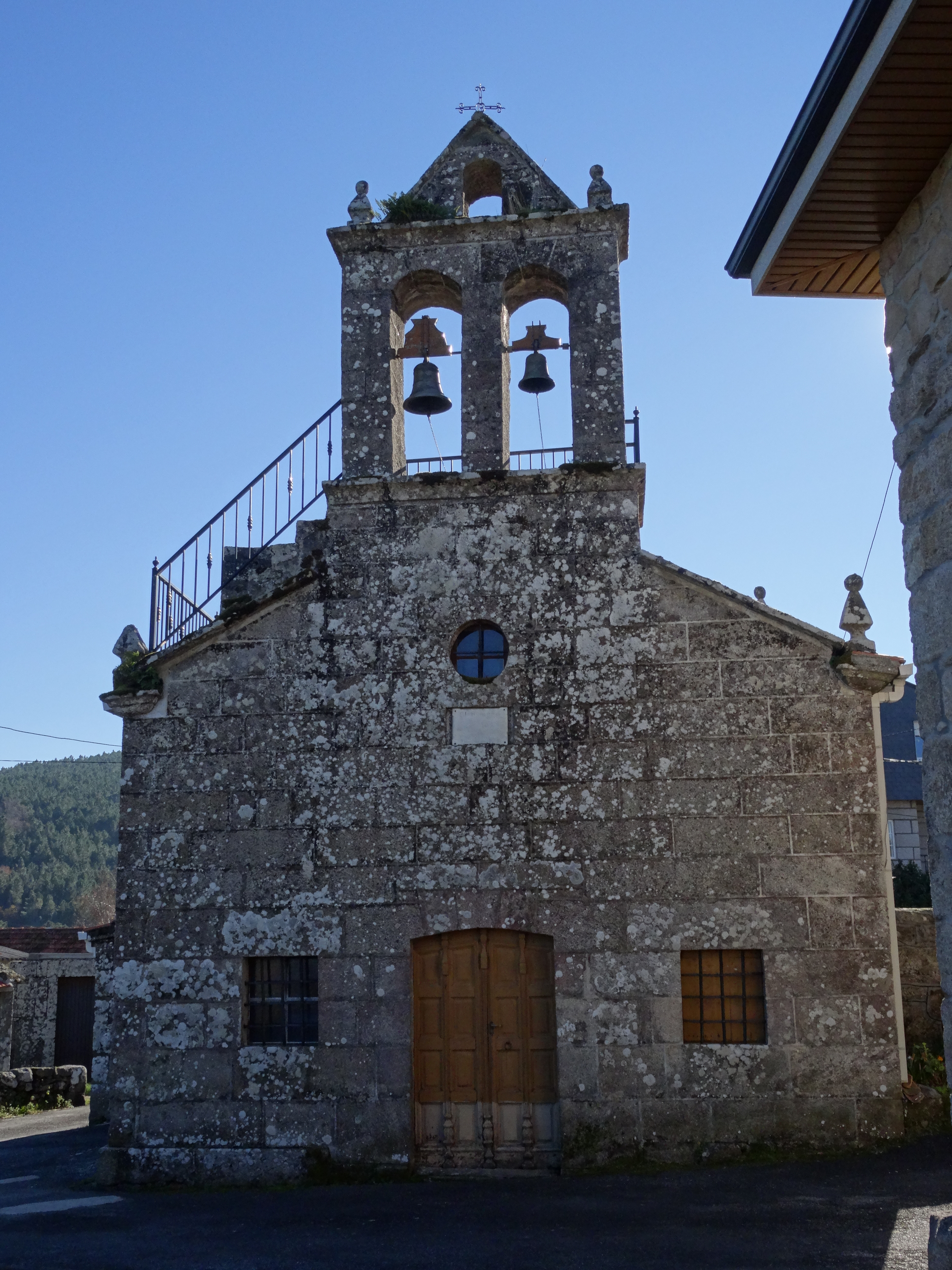 Ver título.